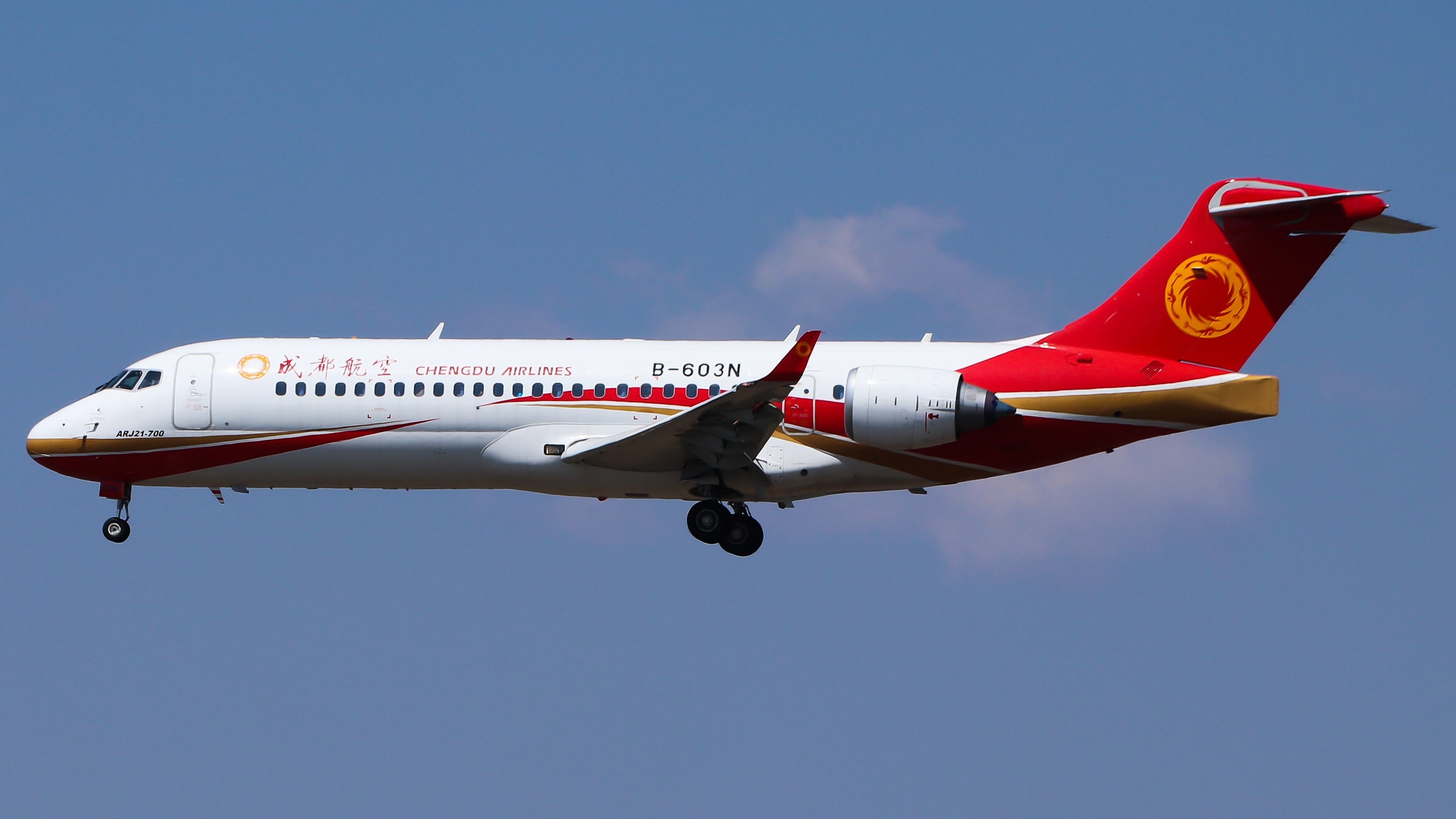 中文（中国大陆）: 成都航空ARJ-21（B-603N）在牡丹江海浪机场